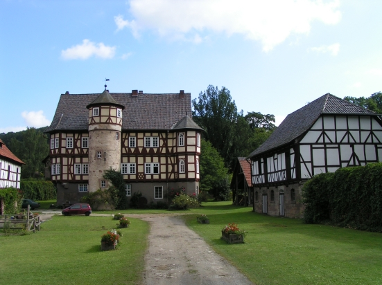 Gutshof in 37214 Witzenhausen-Werleshausen